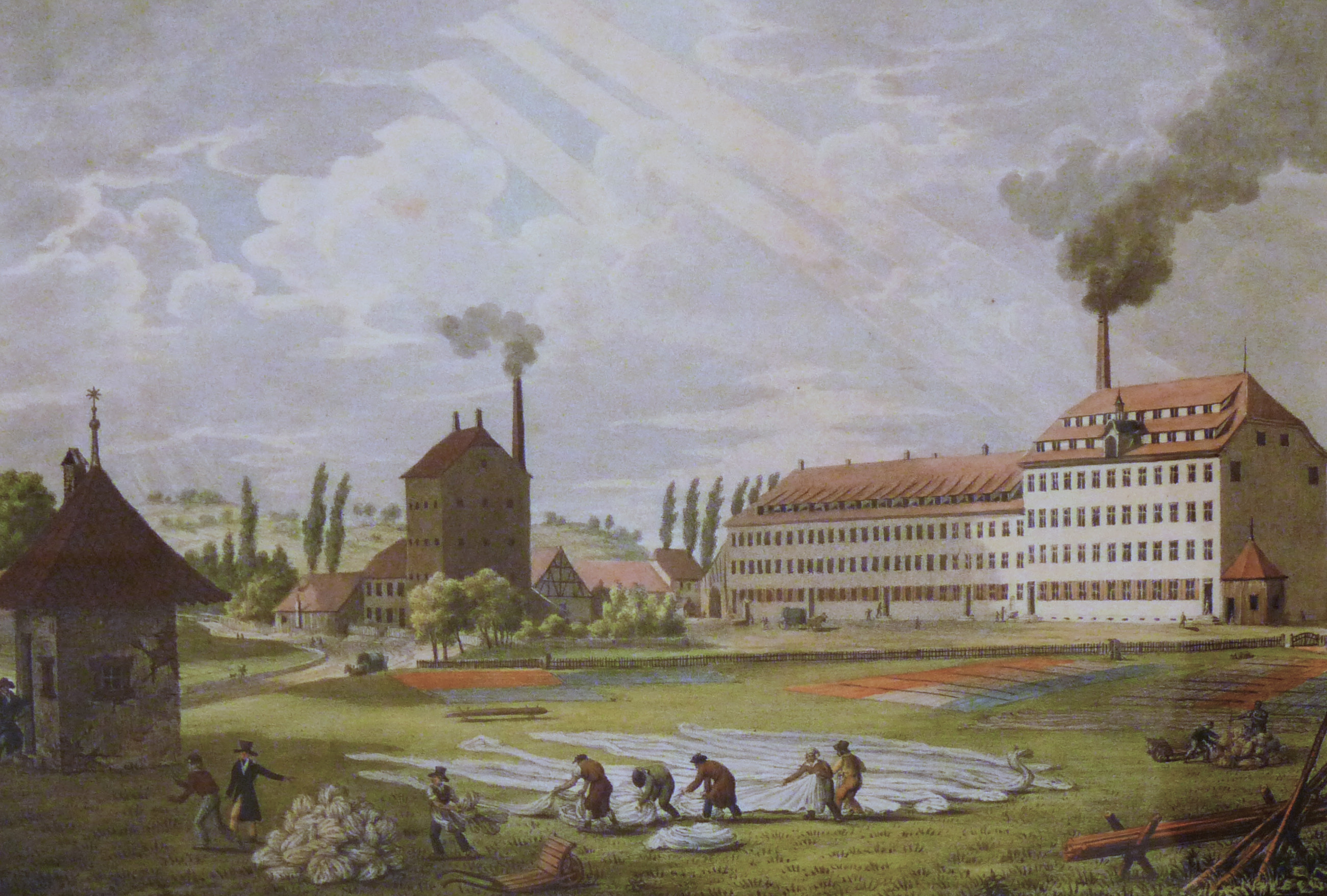 Jean Mieg, Fabrique d'indiennes et filature de Mrs Blech Fries & Cie à Dornach, lithographie aquarellée, in Manufactures du Haut-Rhin, 1822-1825, pl. 20. Musée historique de Mulhouse.